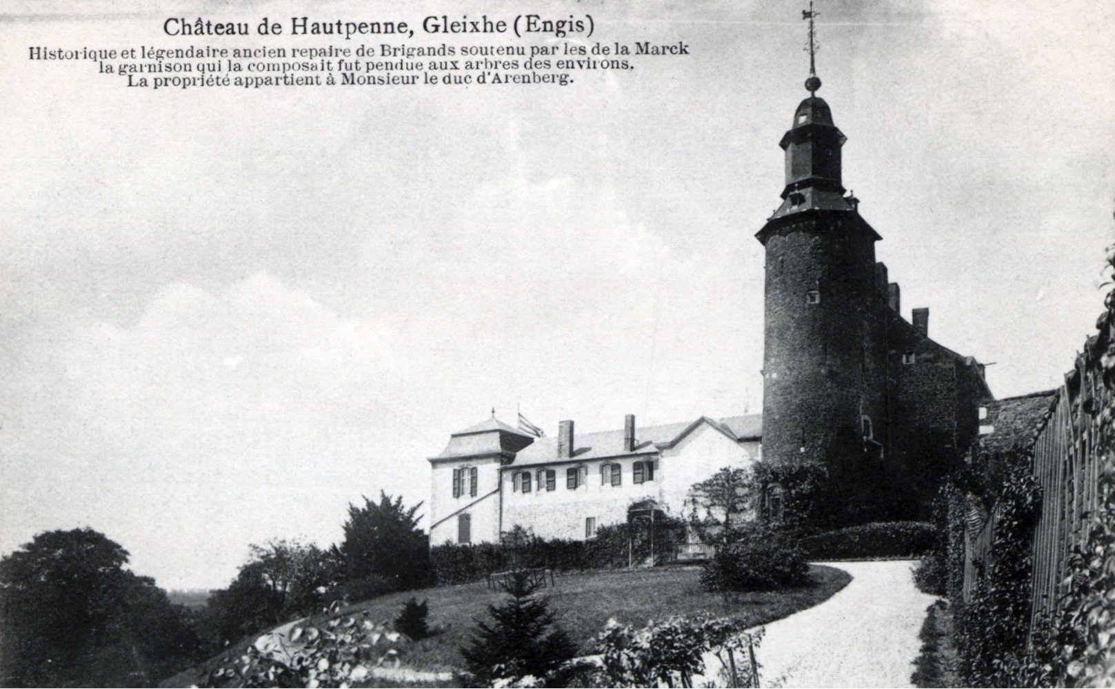 Schloss Haultepenne in Gleixhe bei Flémalle, Belgien, Ende des 19. Jahrhunderts